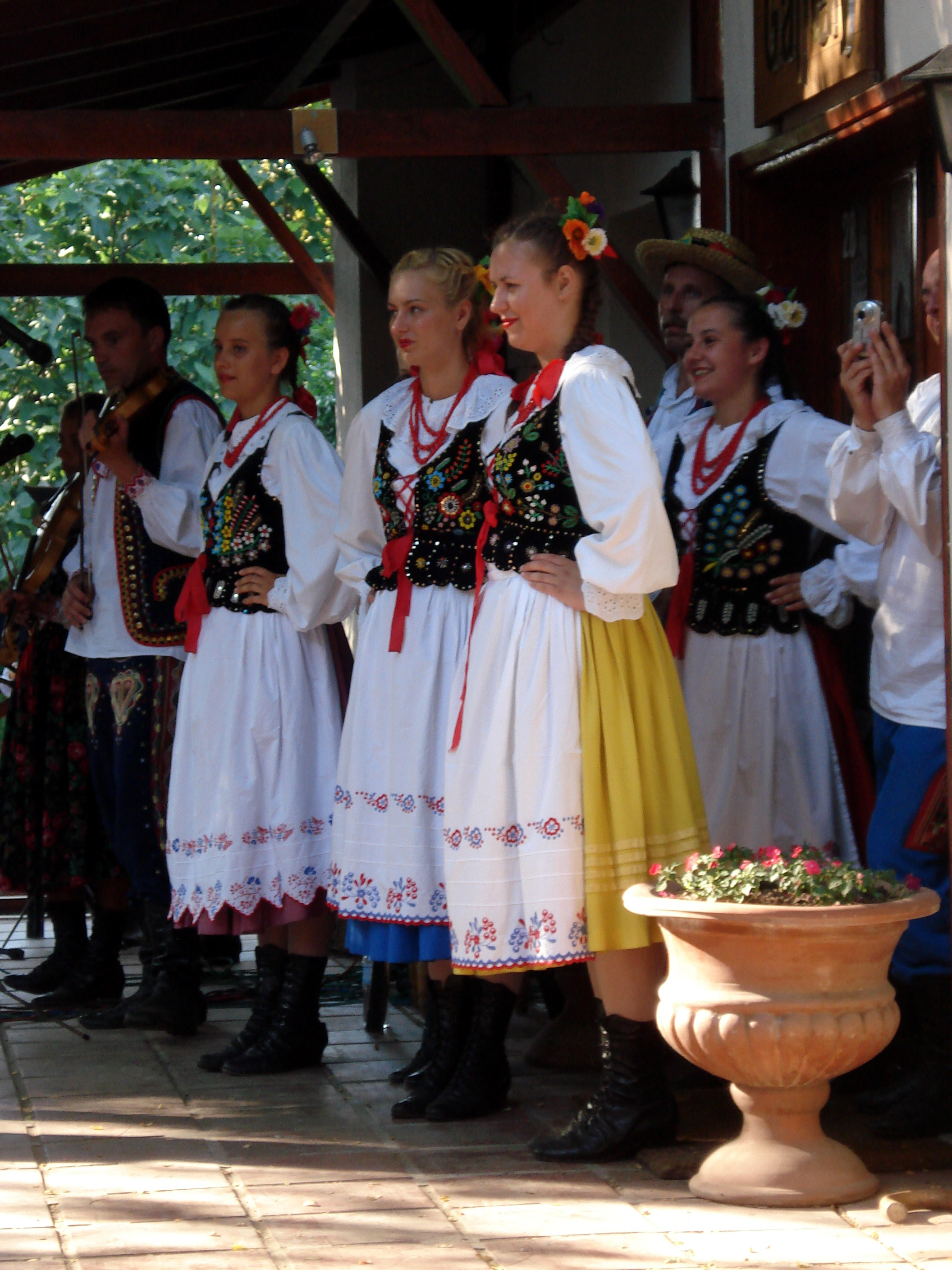 Polonezköy "Kiraz" Festival, Wałbrzych group